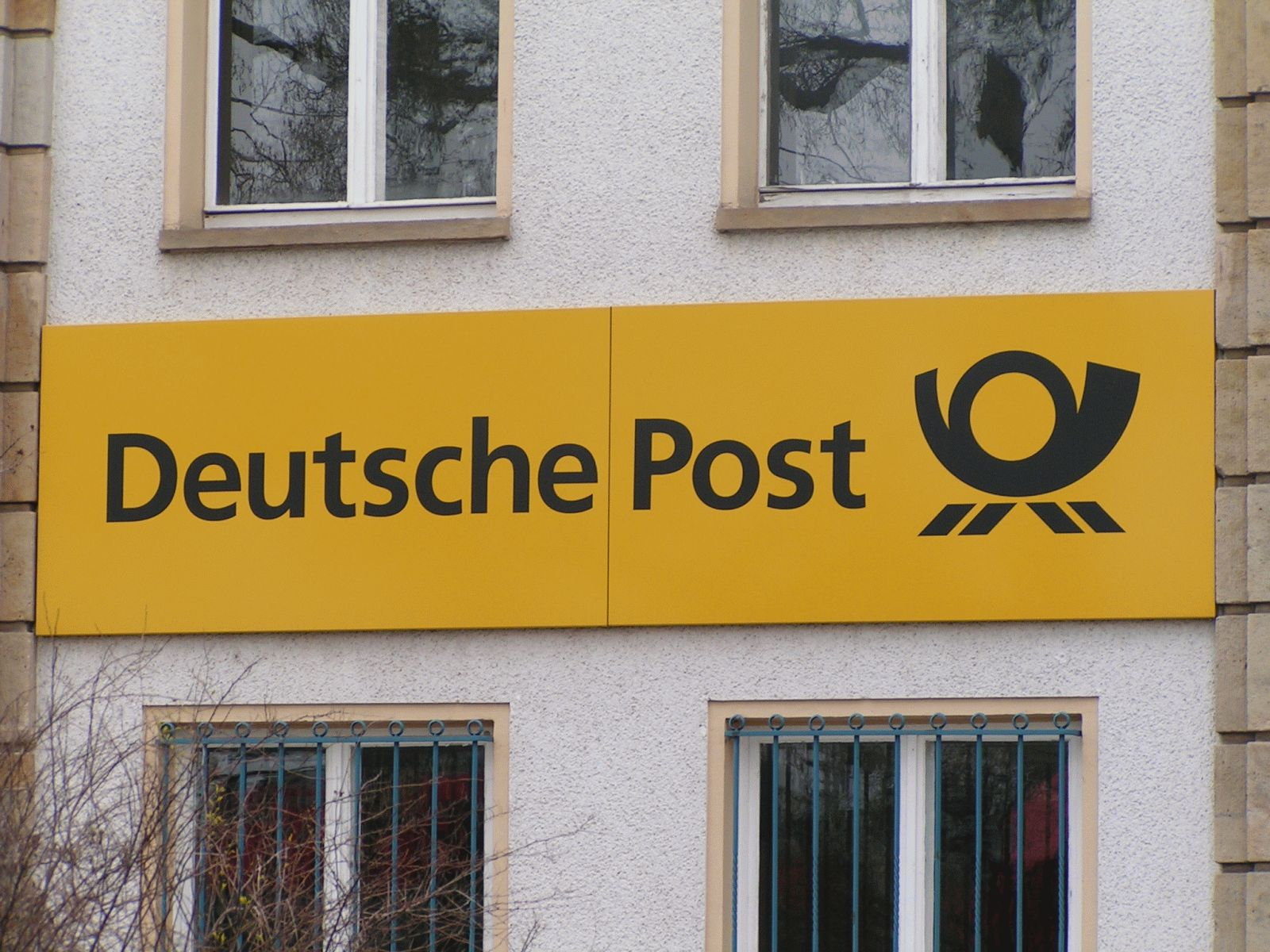 Deutsche Post AG Logo, Filiale der Deutschen Post AG in Dresden, Bayrische Str. 8, 01069 Dresden